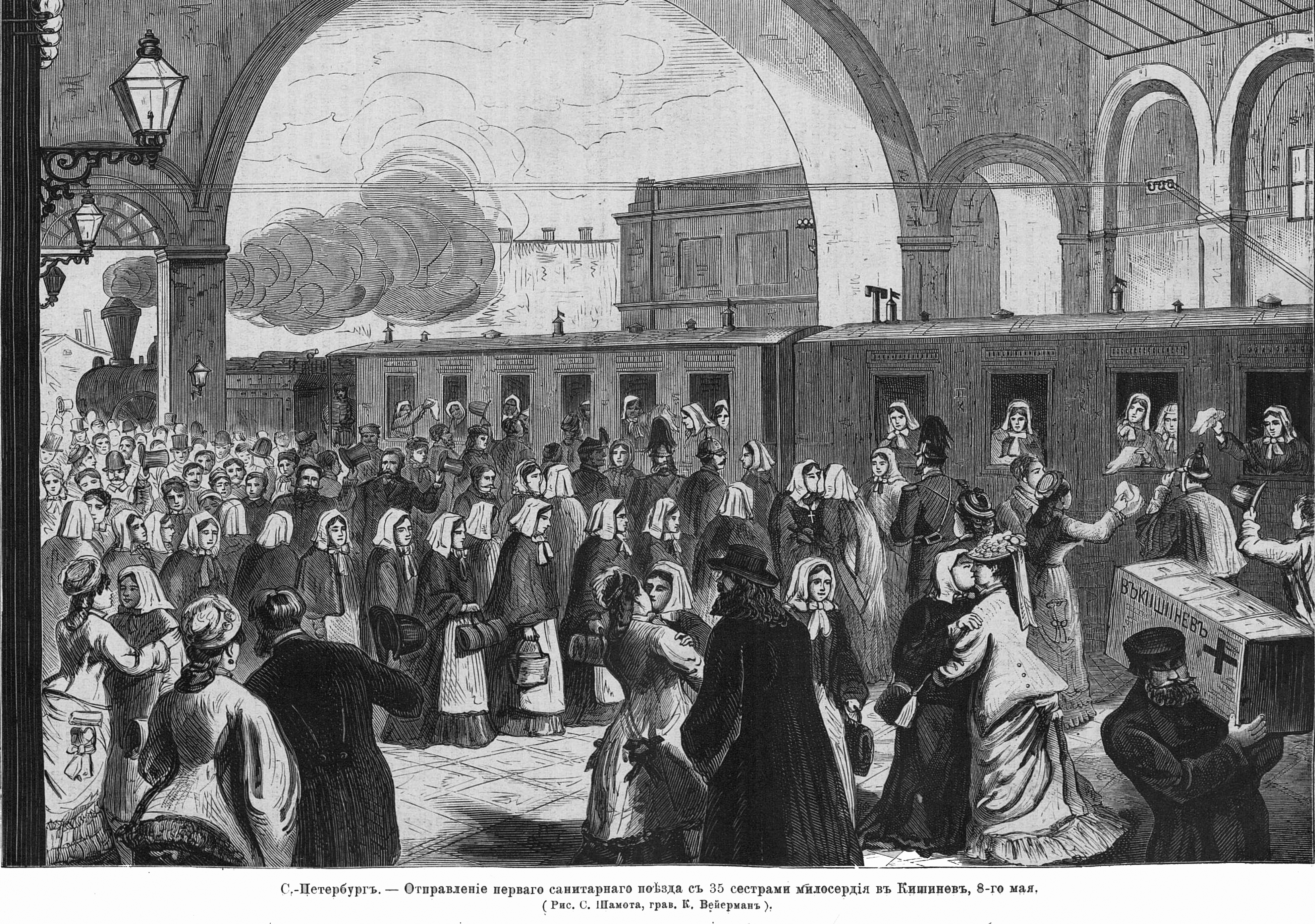 Отправление первого российского санитарного поезда, 1877 год